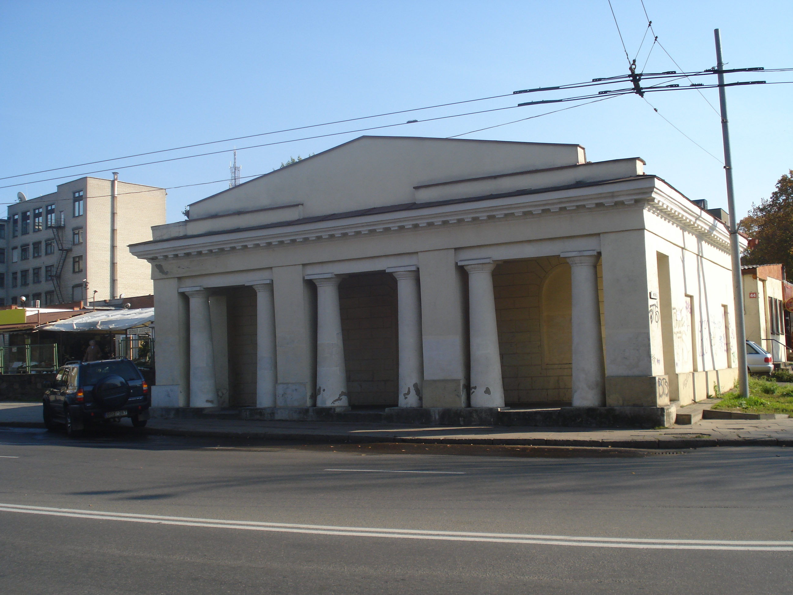 The Vilnius City Guardhouse. Vilniaus miesto sargybinė. Budynek straży mieskiej. Jono Basanavičiaus g. 44 / Muitinės g. 34 (1819)